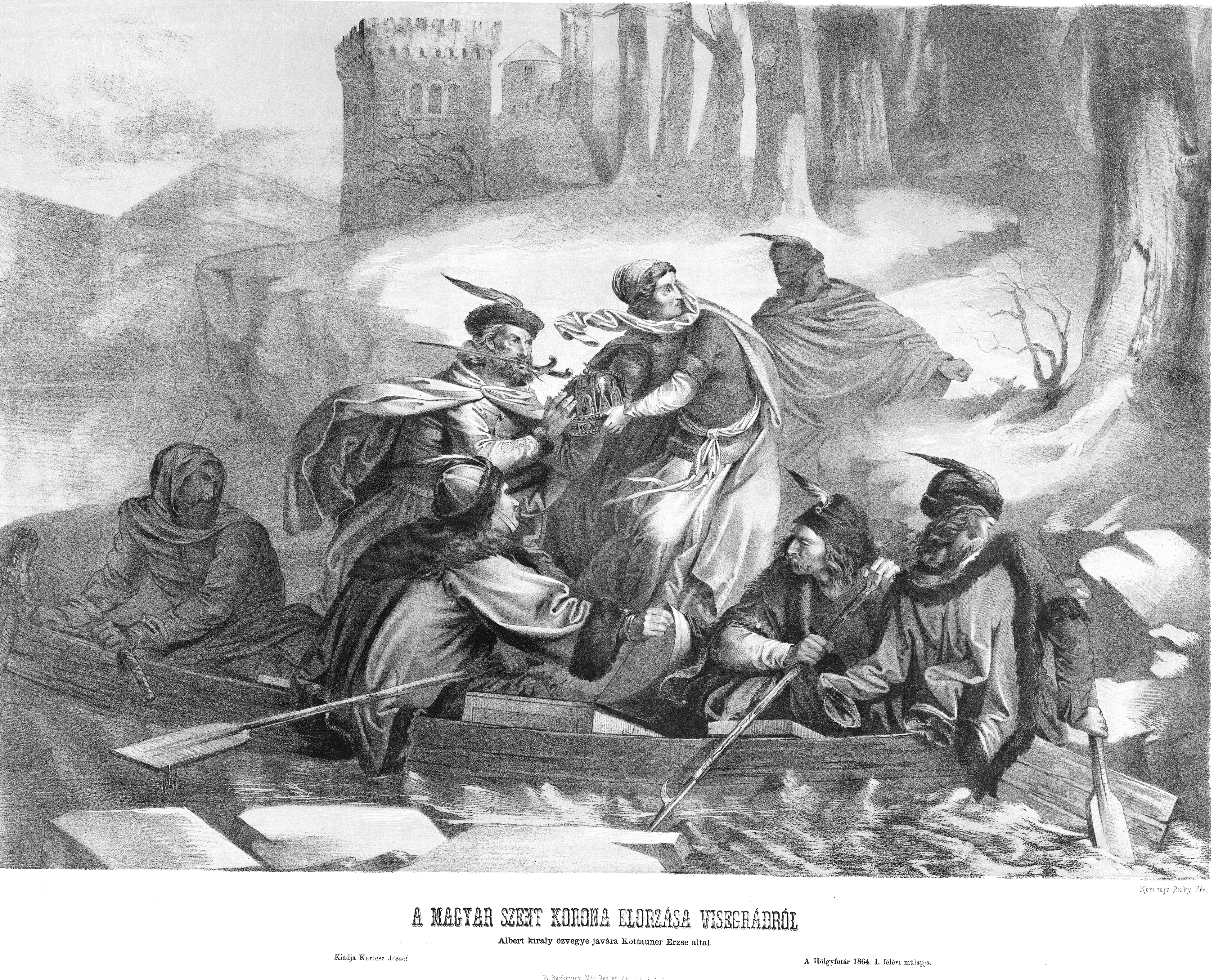 A magyar Szent Korona elorzása Visegrádról. A Hölgyfutár 1864. I. félévi műlapja